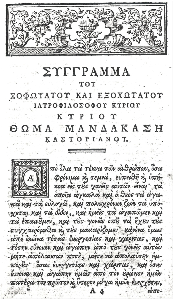 Книга на Томас Мандакасис